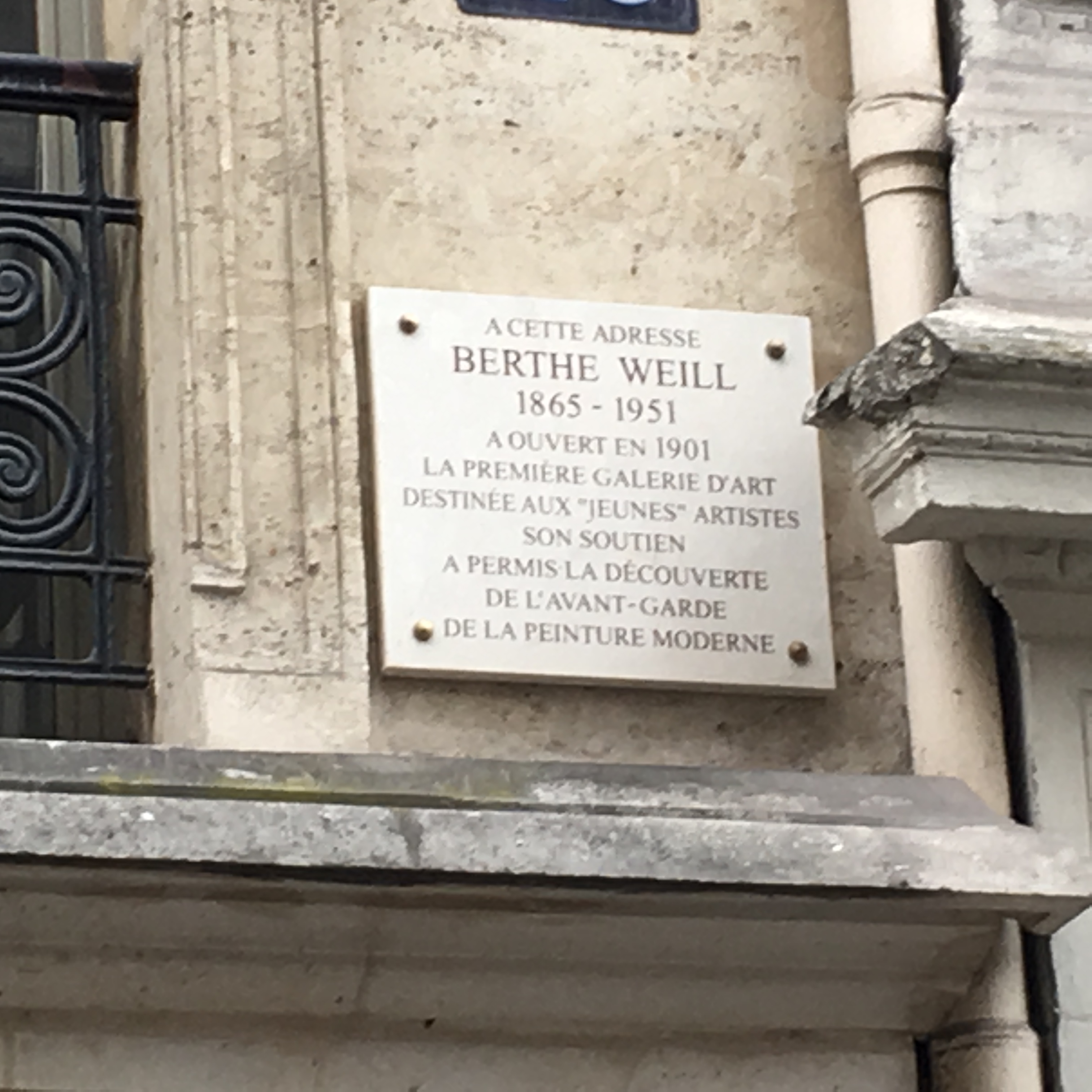 Atelier visite de la Butte Montmartre, 25 rue Victor-Massé, Paris.